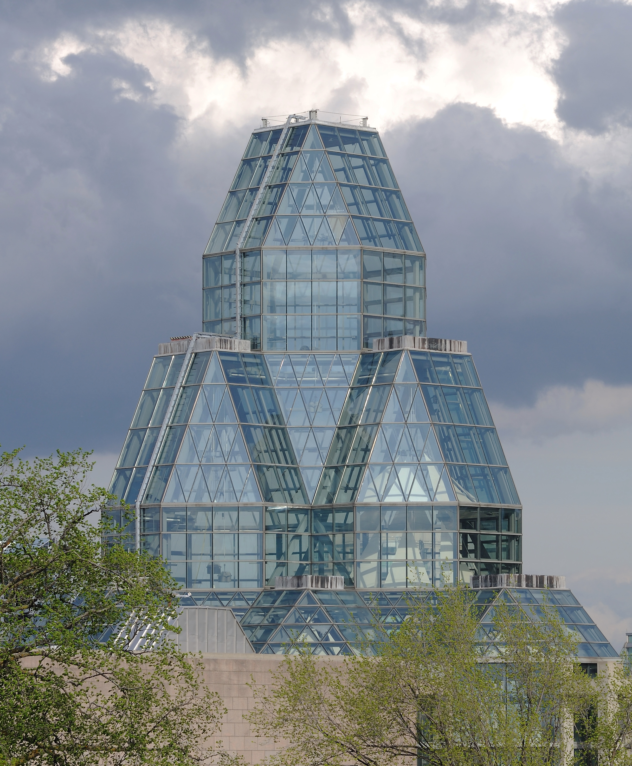 Ottawa: Kuppeln der Nationalgalerie